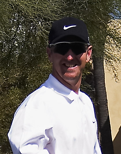 il golfista statunitense David Duval